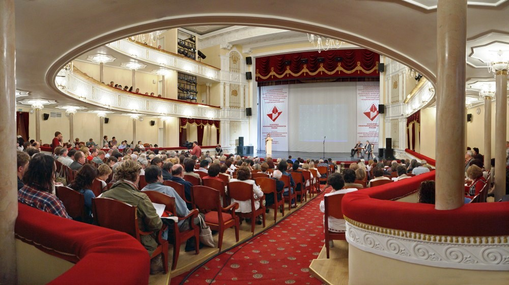 Зрительный зал Музыкального театра Республики Карелия